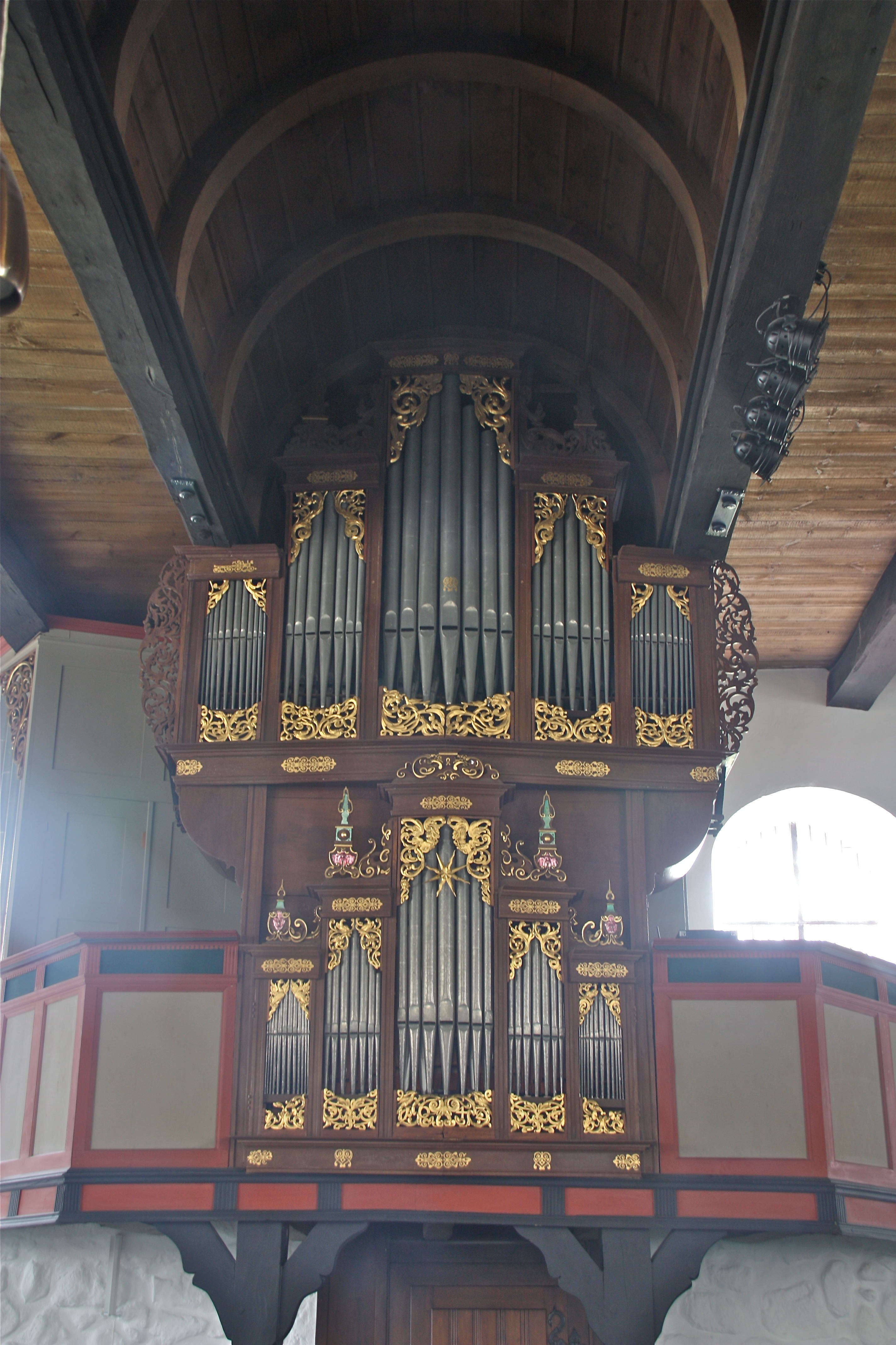 Dithmarschen, Tellingstedt, Kirche St. Martin, barocker Orgelprospekt